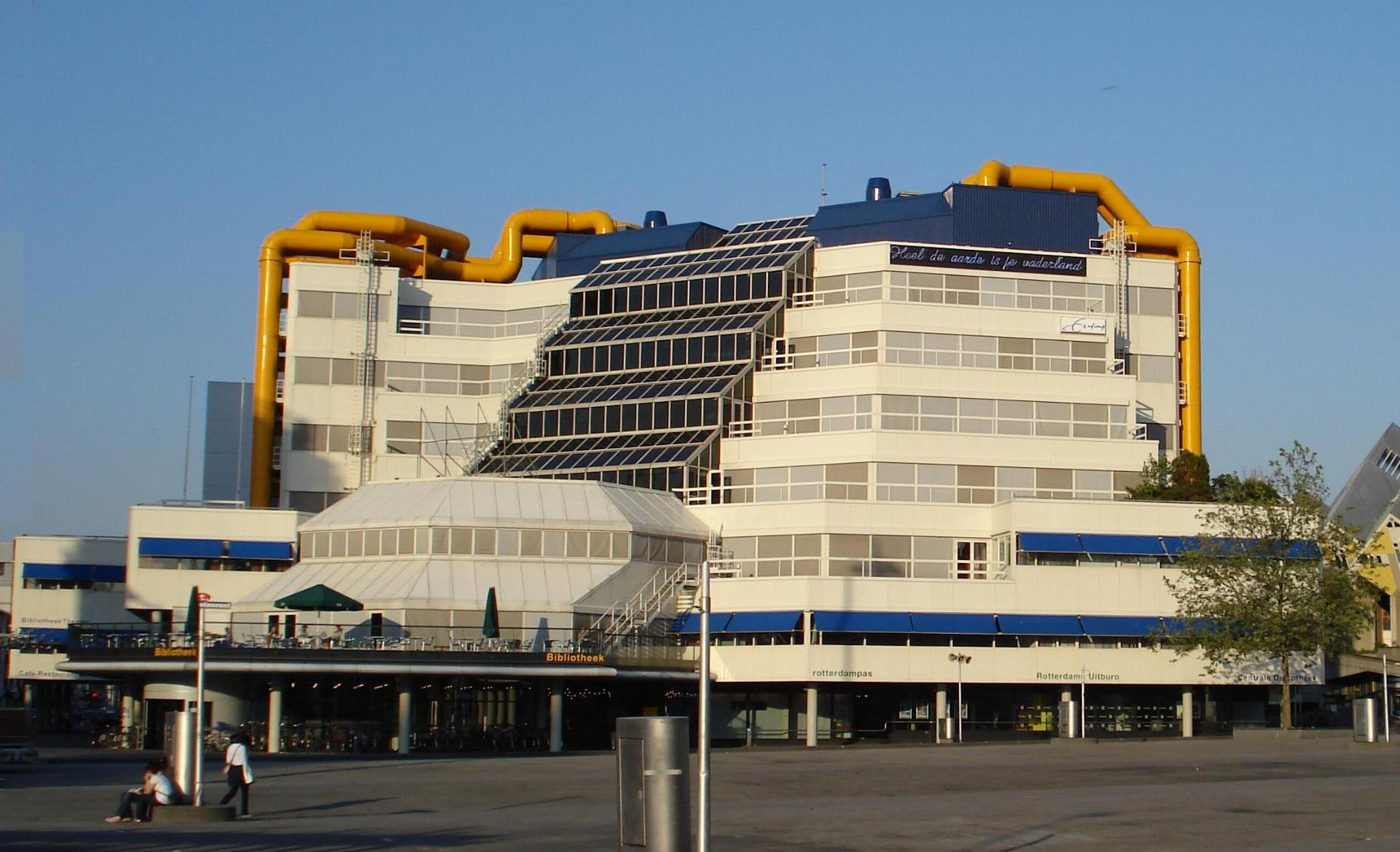 Zicht op een deel van de centrale Bibliotheek Rotterdam